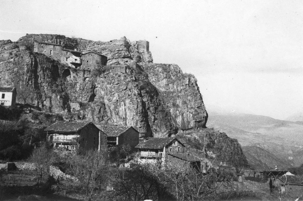 Vista general d'El Querforadat. Cèsar August Torras i Ferreri (Entre 1890 i 1923)